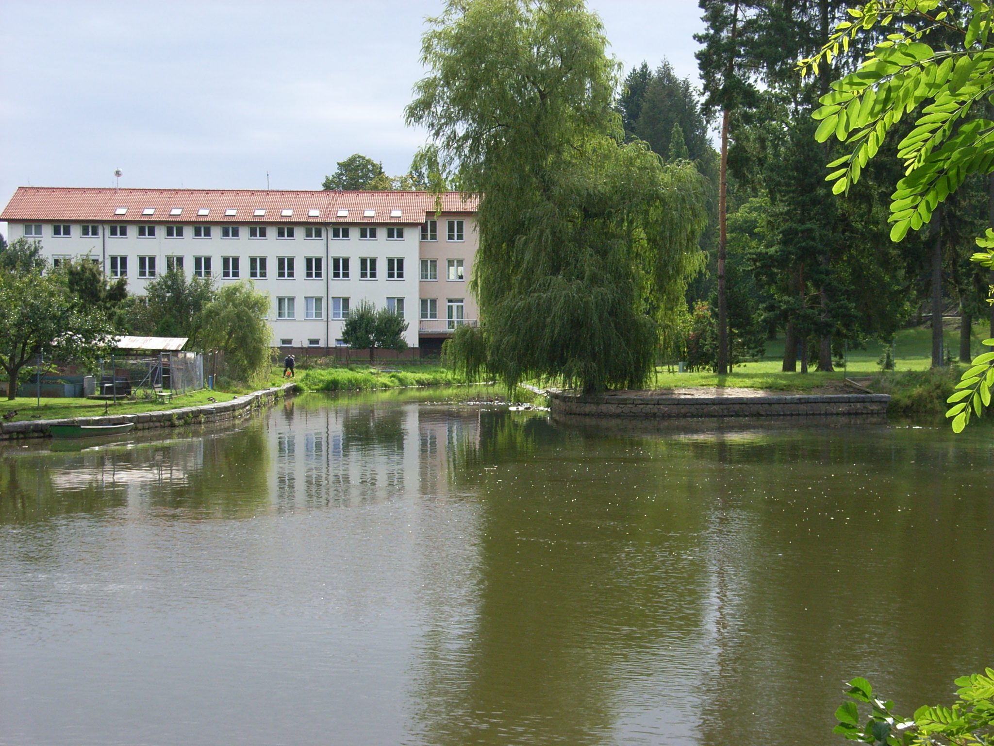 Soutok Kozského potoka s Lužnicí